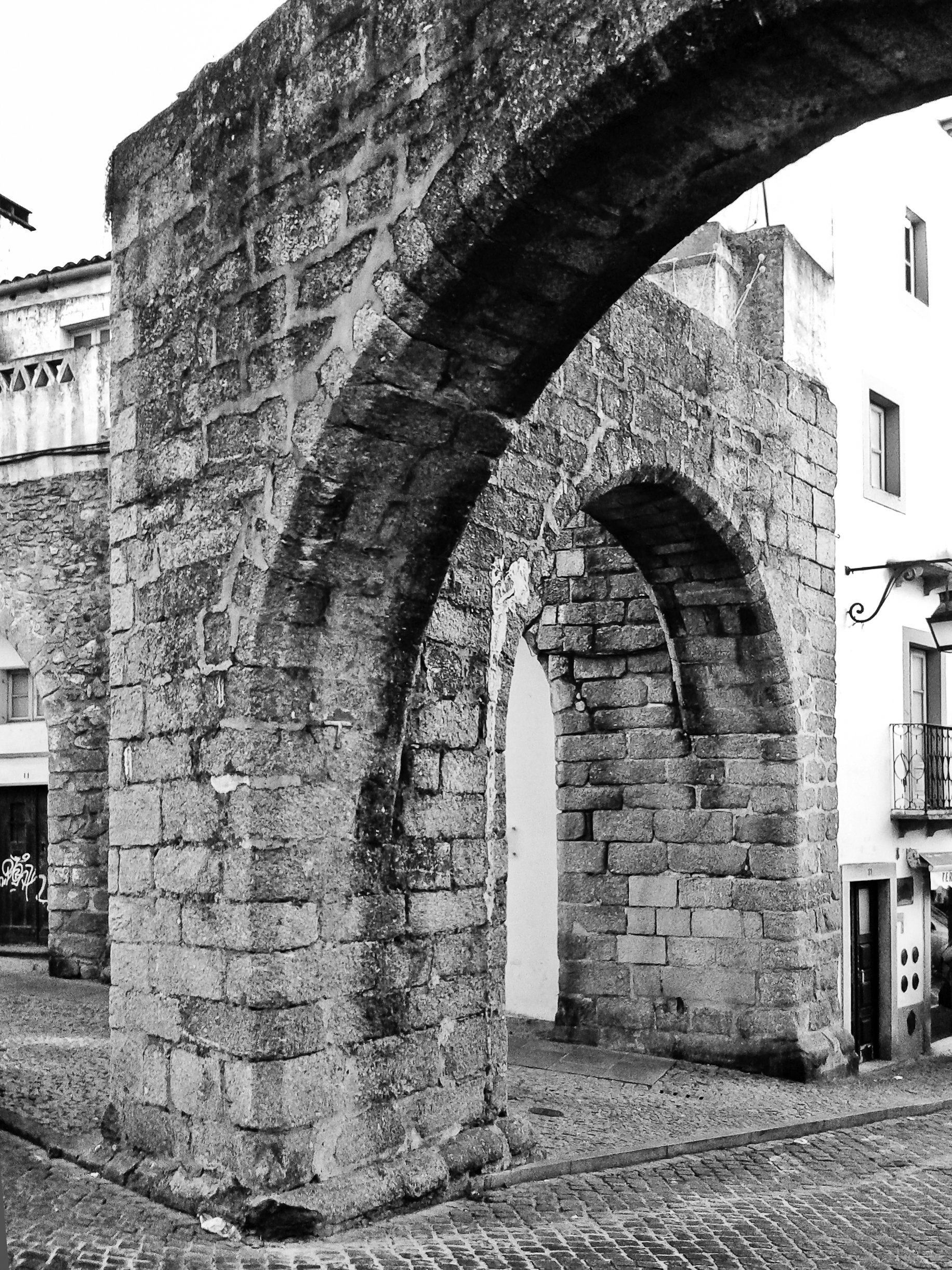 Arcadas do Aquetuto da Água da Prata a contornar a paisagem urbana entre o Largo Luis de Camões e a Rua de Aviz e a Rua do Salvador em Évora.